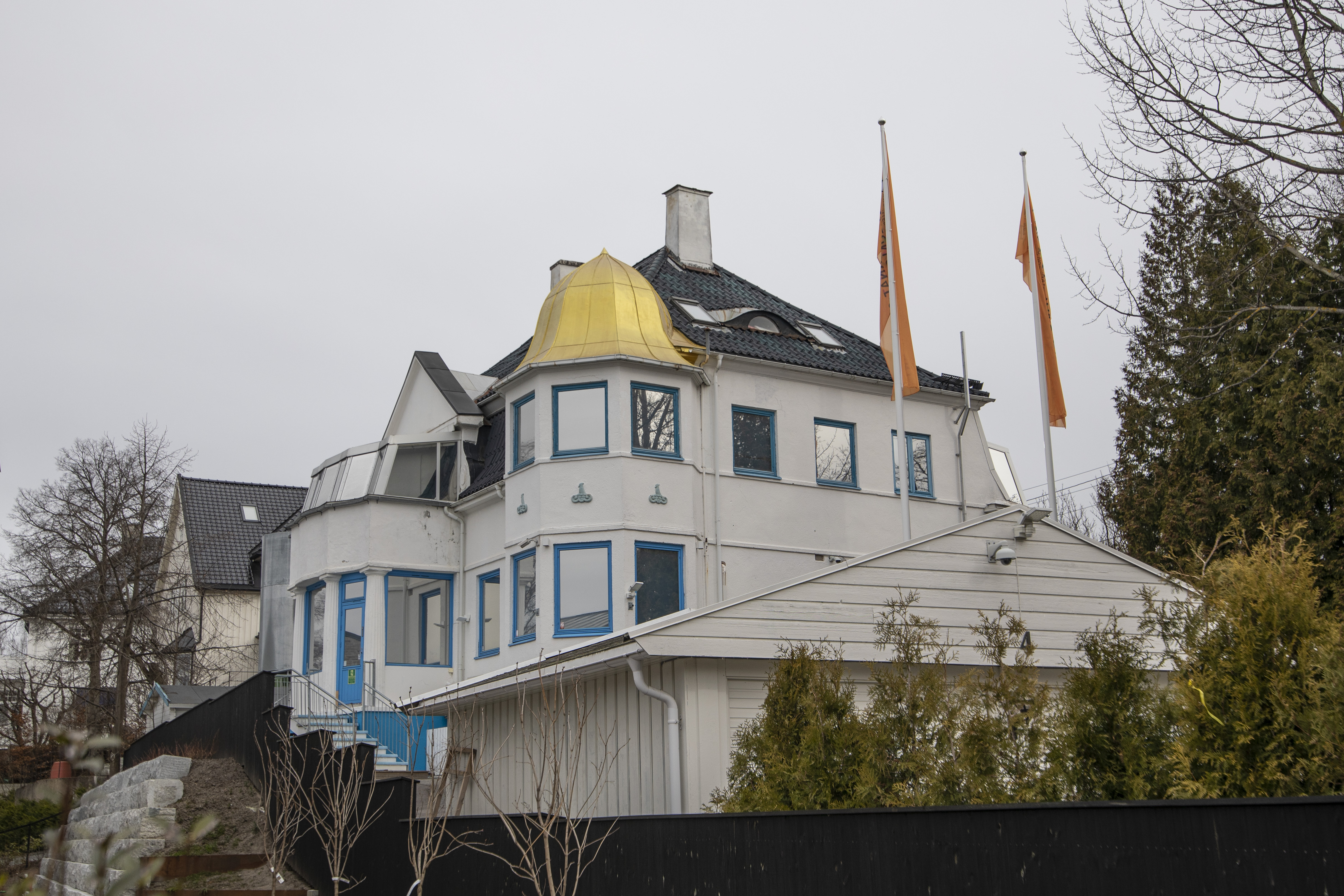 Det internasjonale barnekunstmuseet i Oslo